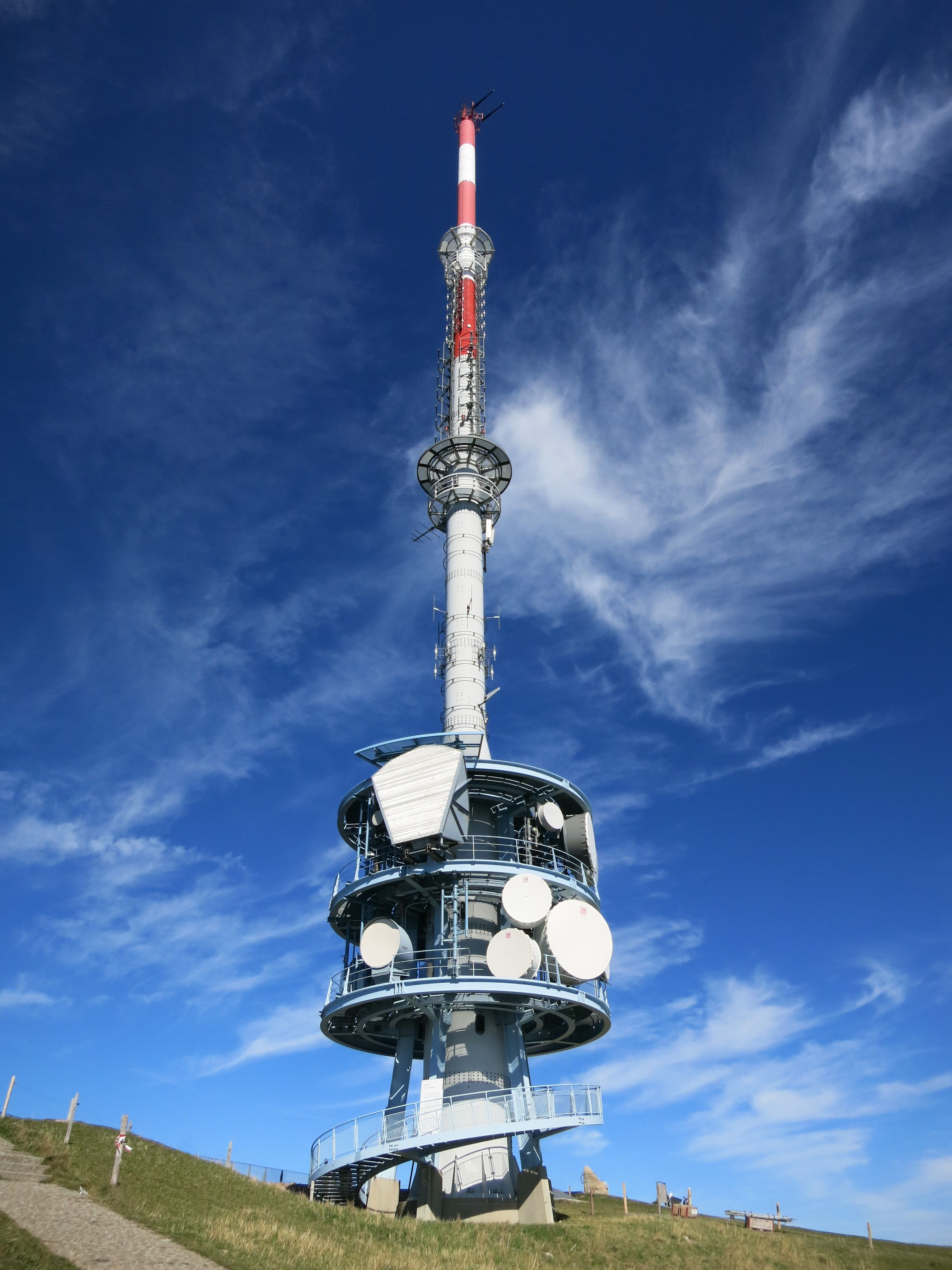 Sendeanlage Rigi Kulm